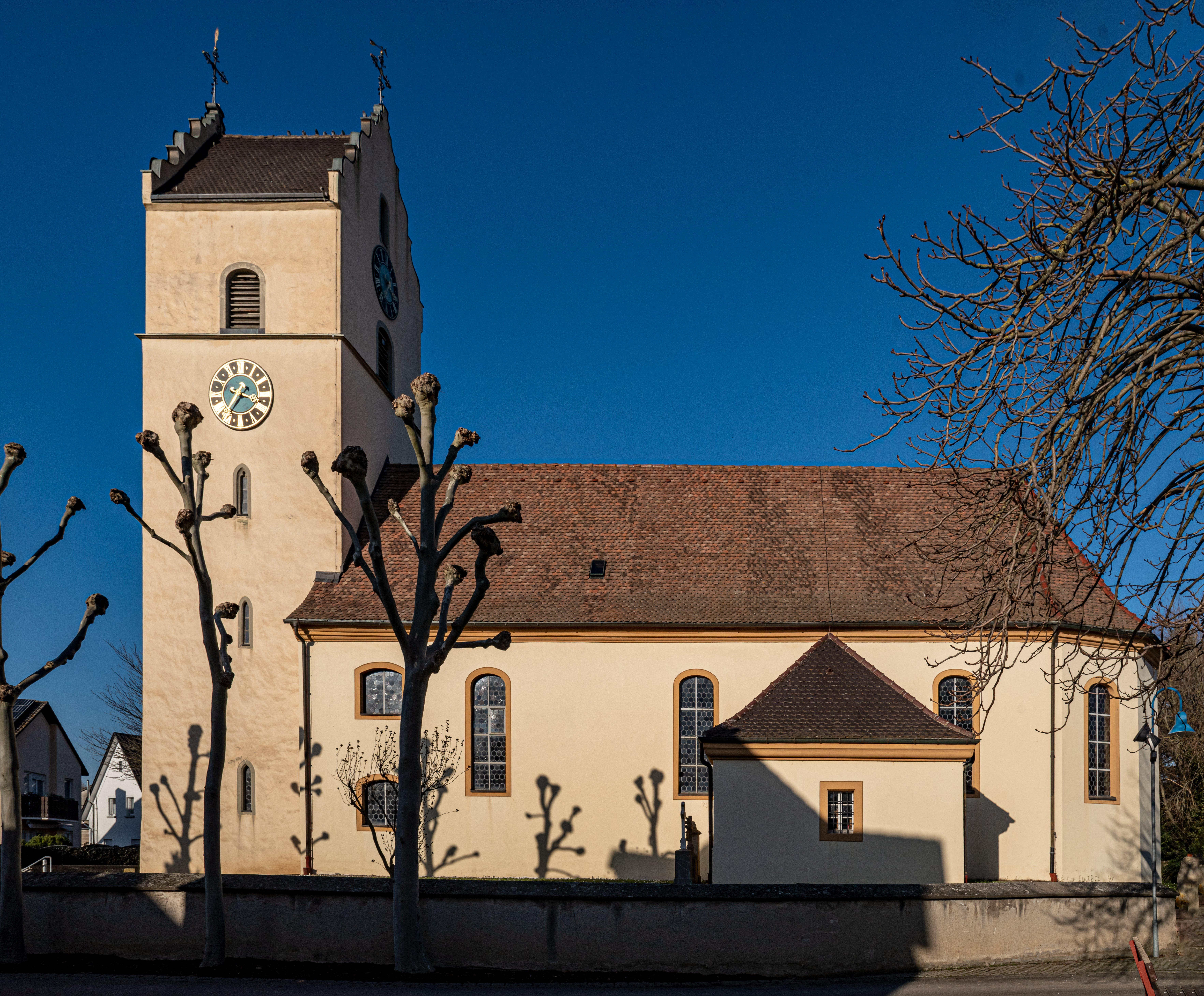 Bilder von St. Martin in Feldkirch